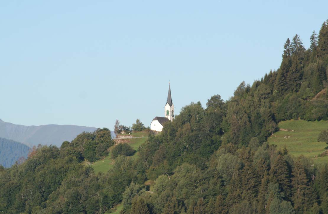 Kirche von Ladir